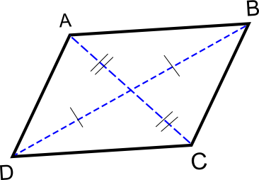 איור לערך "מקבילית". נוצר על ידי GNU בעזרת תוכנות חופשיות בלבד.